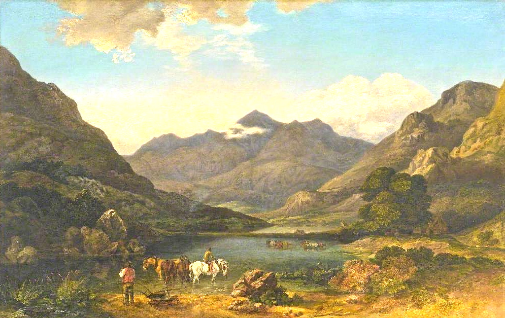 Snowden from Llyn Nantle